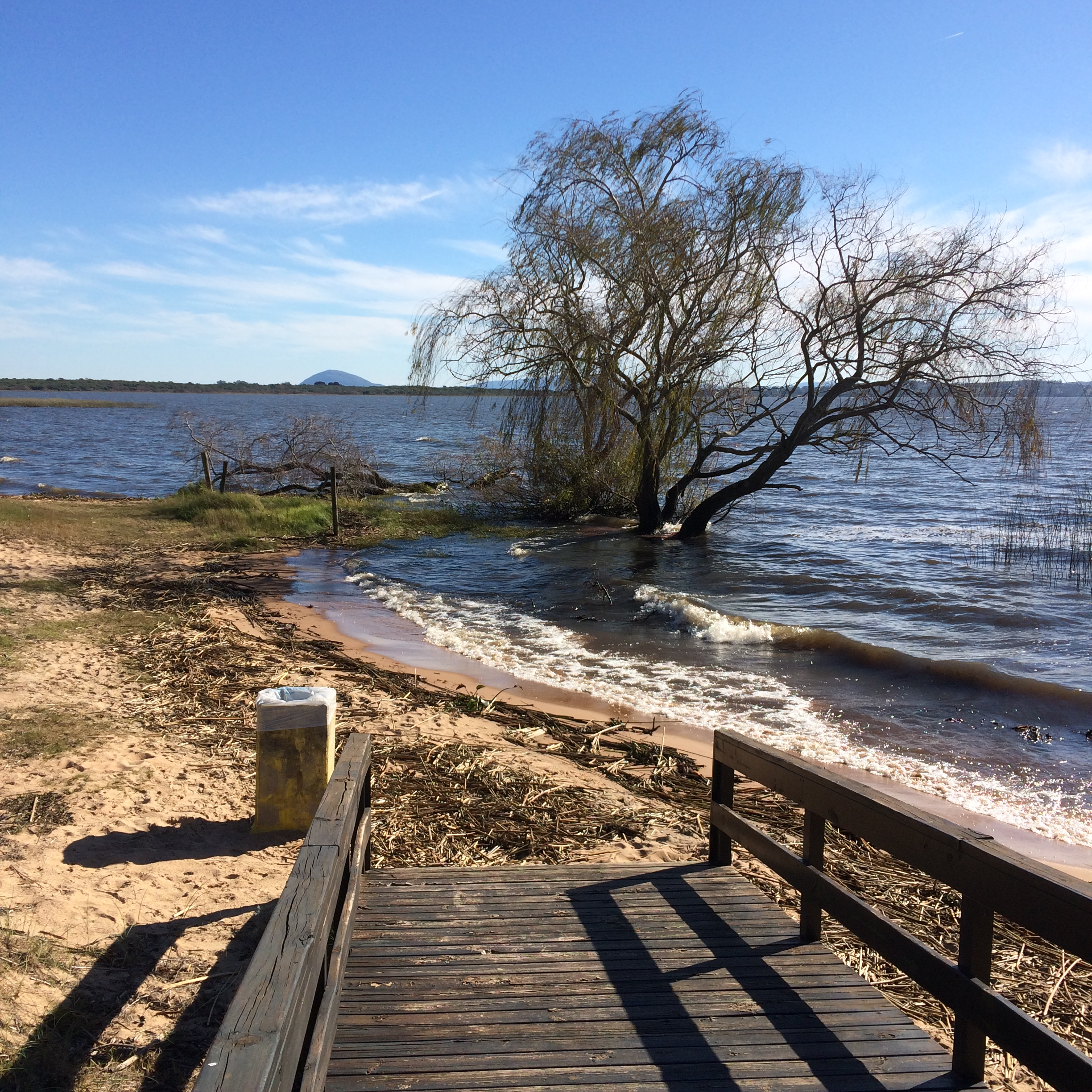 Laguna del Sauce, Uruguay